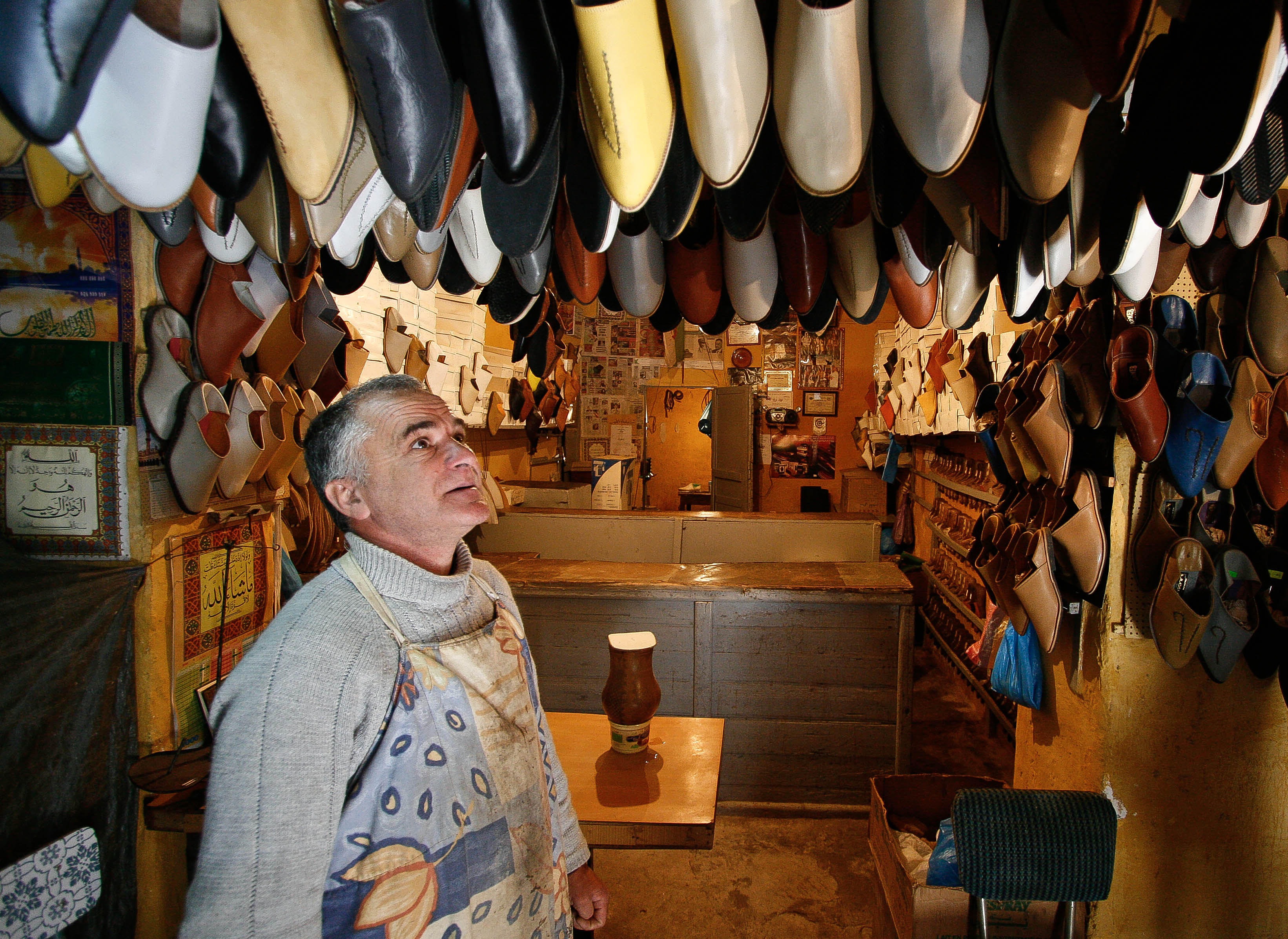 Nedroma, Tlemcen un travail ancestrale du babouche This is an image of "African people at work" from Algeria